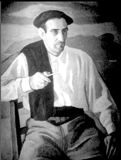 Xenpelar bertsolaria